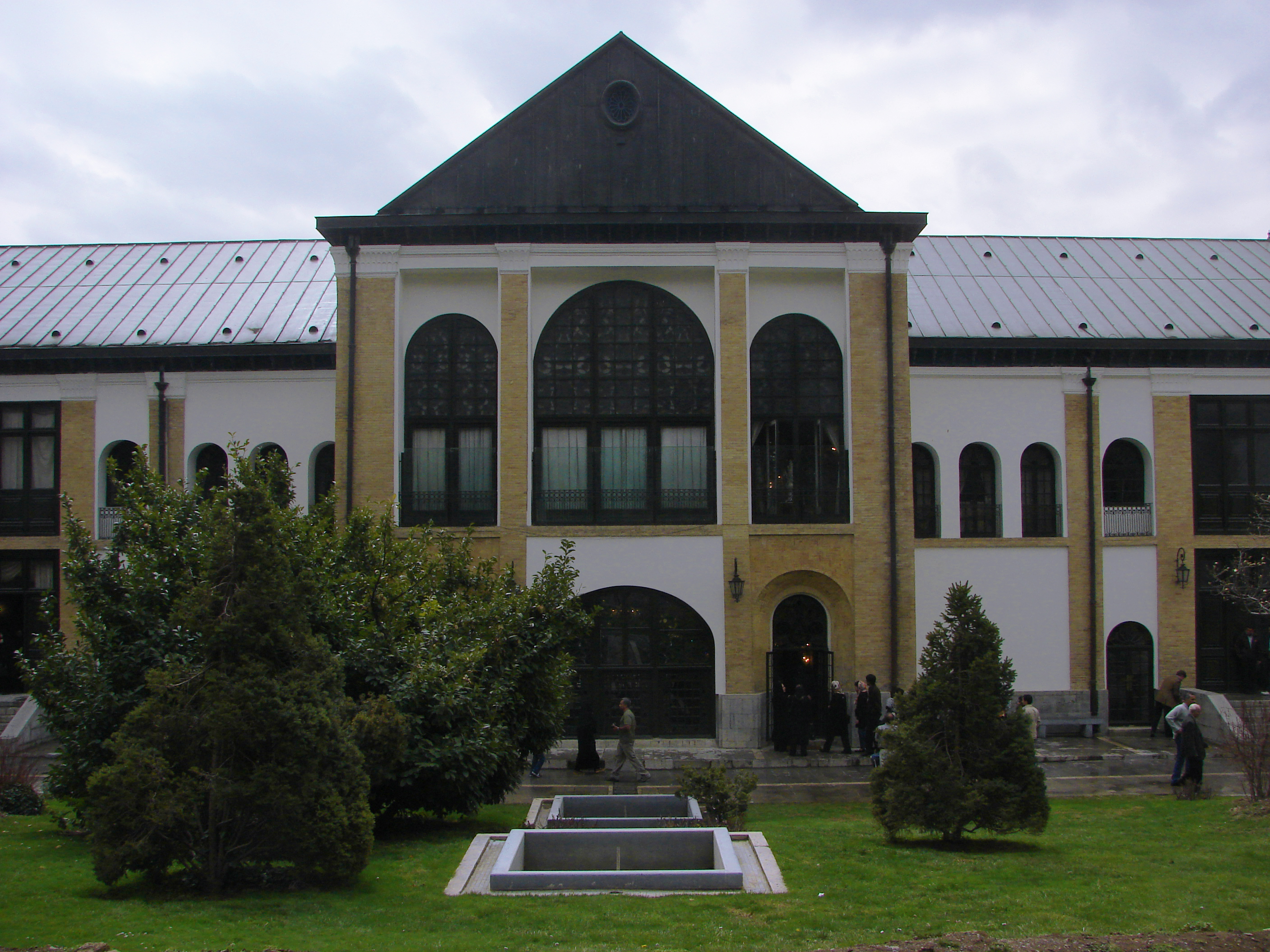 Sahebgharanie palace, Tehran